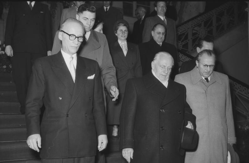 Berlin, 4. Jahrestag DDR-Gründung, Dieckmann, Pieck, Grotewohl Zentralbild/Krueger, 7.10.1953 Festsitzung der Volks- und Länderkammer am 7.10.1953 Am 4. Jahrestag der Gründung der Deutschen Demokratischen Republik wurde in der gemeinsamen Festsitzung der Volks- und Länderkammer Präsident Wilhelm Pieck einstimmig wiedergwählt. UBz: Der wiedergewählte Präsident der Deutschen Demokratischen Republik Wilhelm Pieck verläßt in Begleitung des Präsidenten der Volkskammer Dr.h.c. Dieckmann (links) und Ministerpräsident Grotewohl (rechts) die Volkskammer. [Johannes Dieckmann, Wilhelm Pieck, Otto Grotewohl] Abgebildete Personen: Pieck, Wilhelm: Präsident, Politbüro der SED, Vorsitzender der KPD, DDR Dieckmann, Johannes: Präsident der Volkskammer der DDR, DDR (GND 118678248) Grotewohl, Otto: Ministerpräsident, stellvertretender Staatsratsvorsitzender, DDR